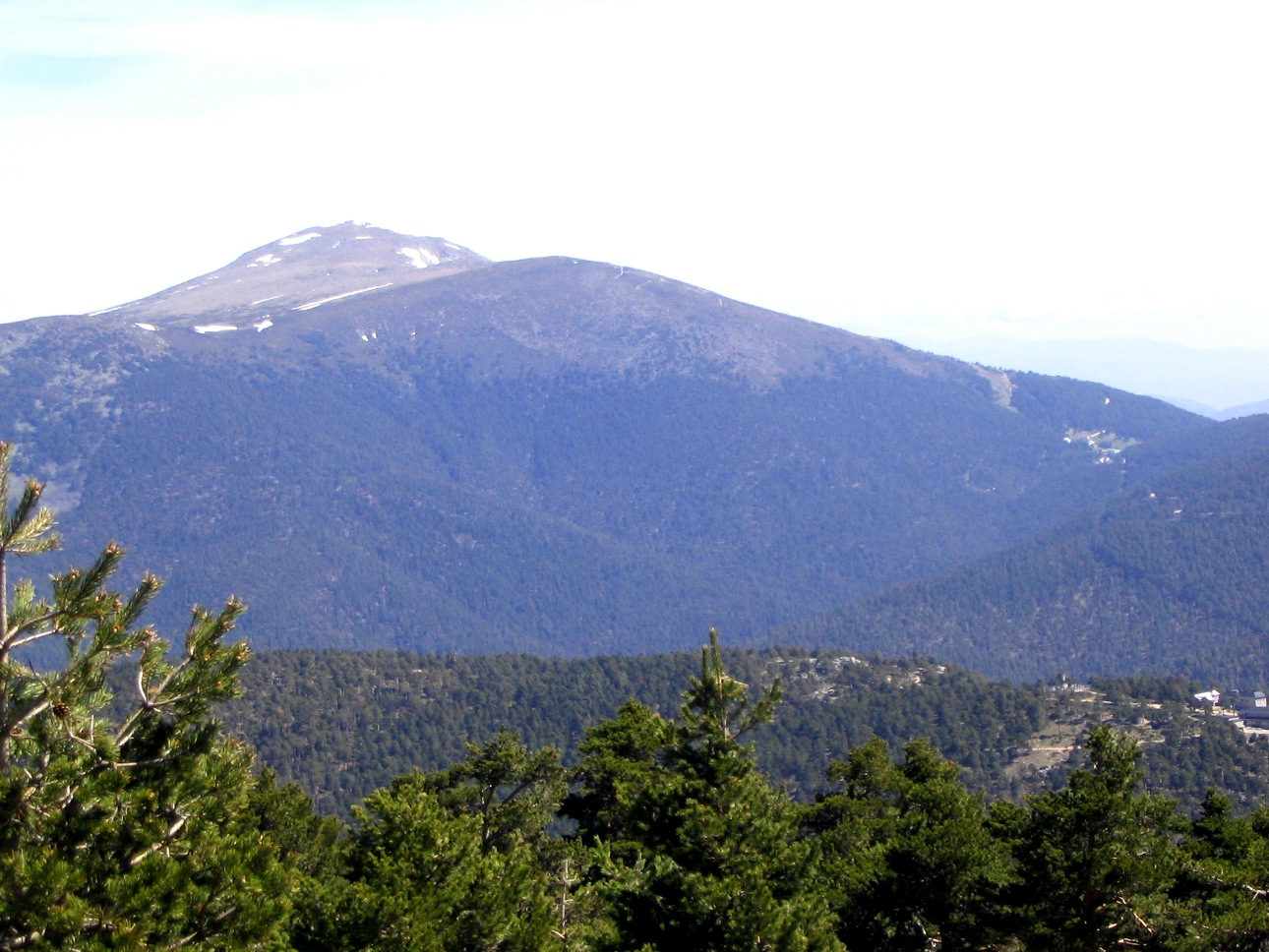 es: Vista primaveral de Peñalara